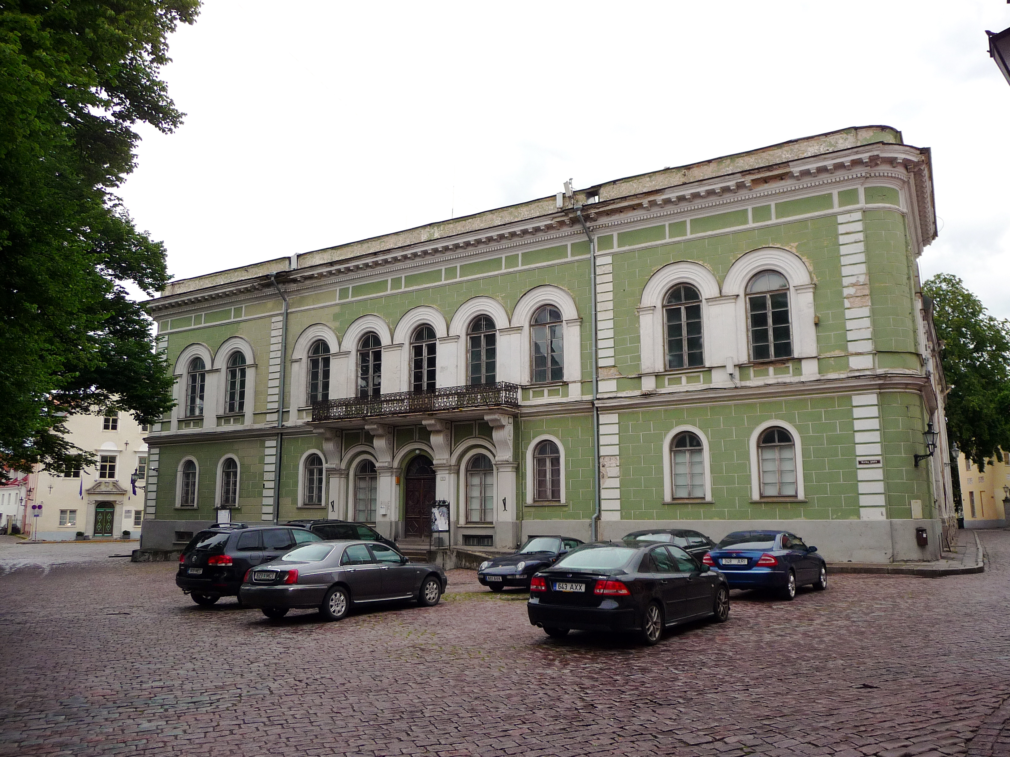 Rüütelkonna hoone Tallinnas Toompeal.